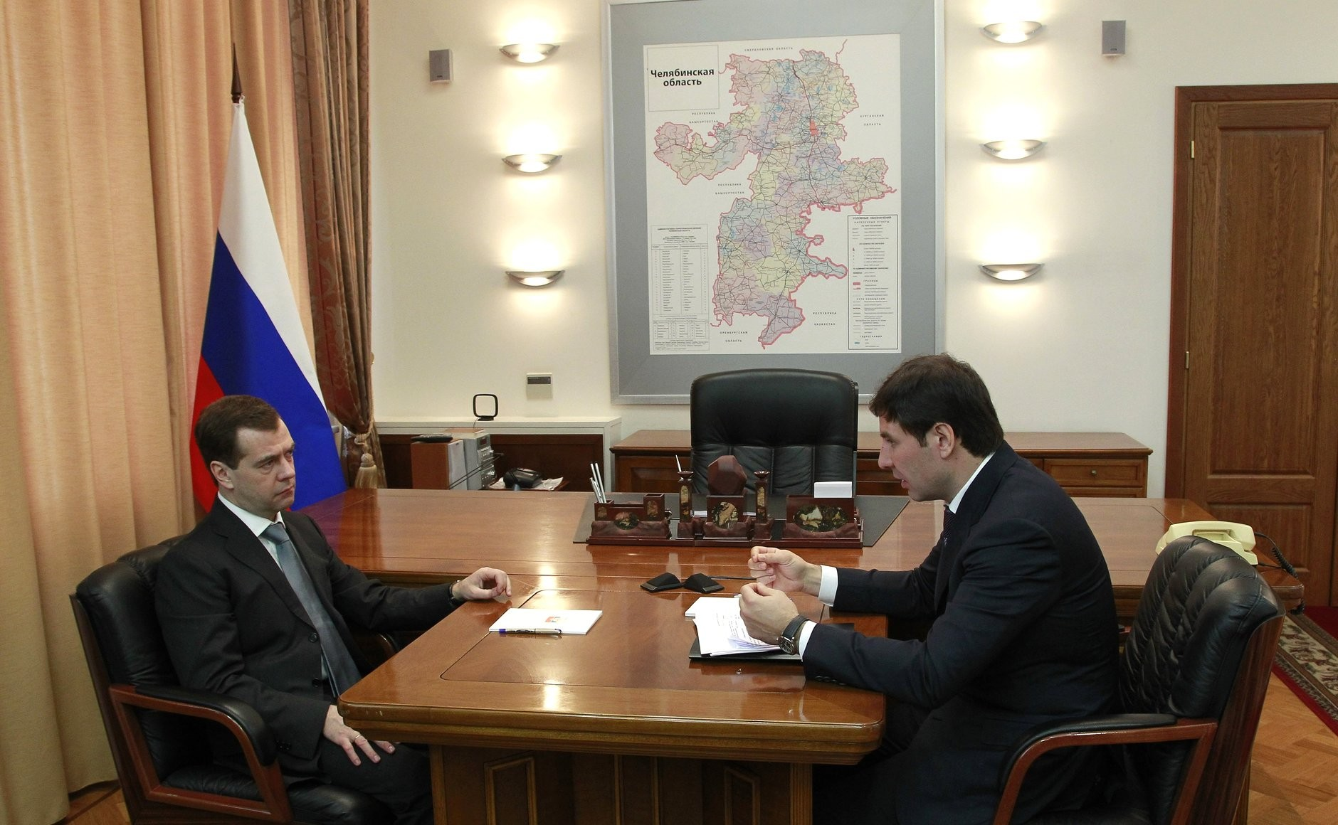 Дмитрий Медведев с губернатором Челябинской области Михаилом Юревичем